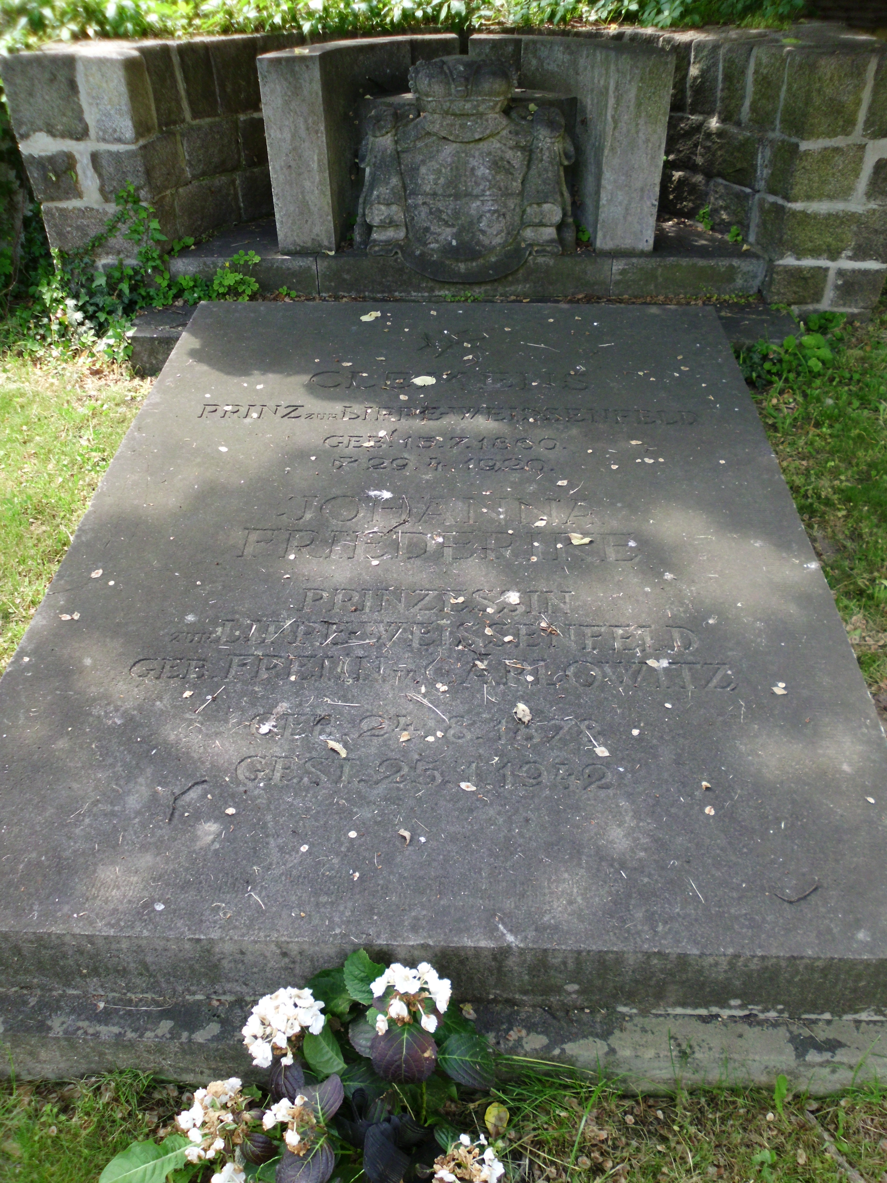 Evangelisch-Lutherisches Kirche Baruth. Über den Erstbau fehlen Unterlagen. 1813 brannte die Kirche vollständig ab. Das an gleicher Stelle erbaute Gotteshaus wurde 1819 geweiht.